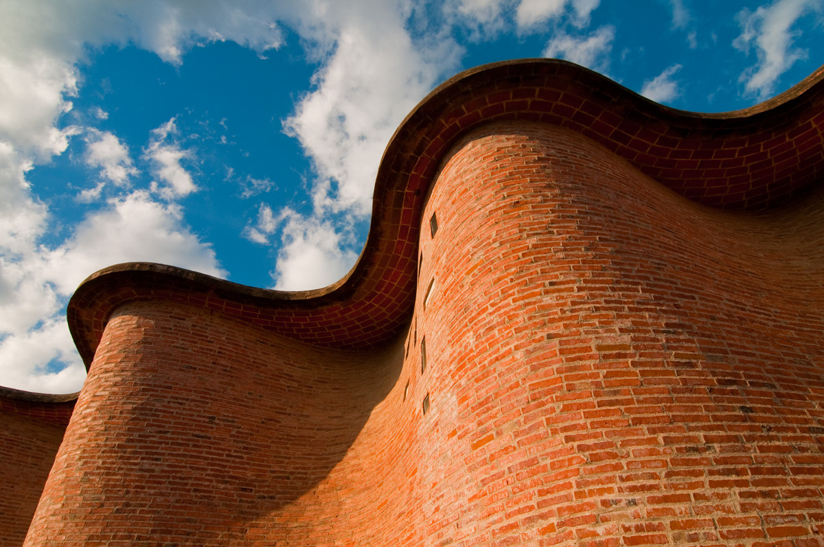 Iglesia de Cristo Obrero y Nuestra Señora de Lourdes. Ubicada en el departamento de Canelones